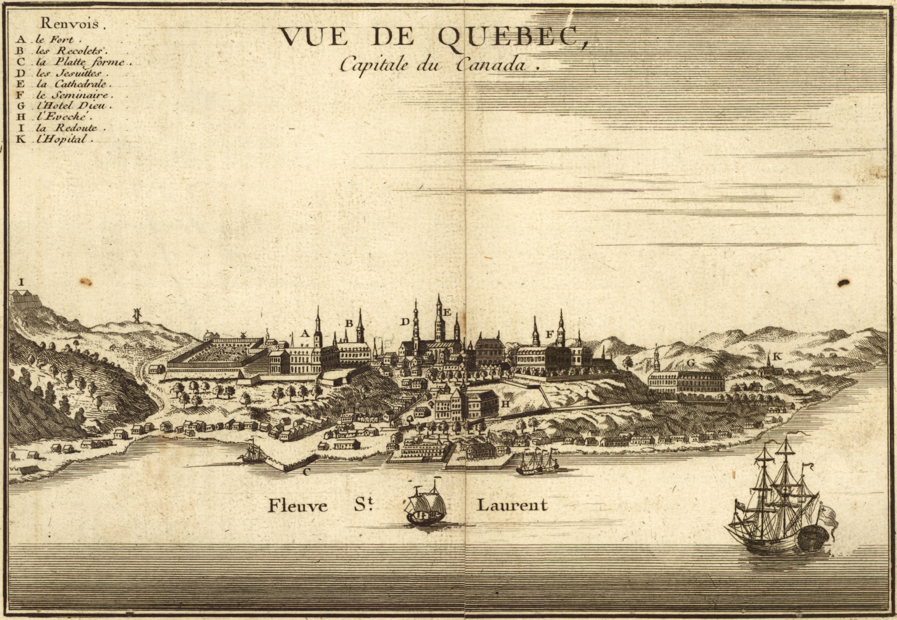 Dessin de la ville avec des renvois sur les principaux bâtiments ou quartiers en 1755 par le géographe royal Georges-Louis Le Rouge. Taille : 18 X 25 cm.